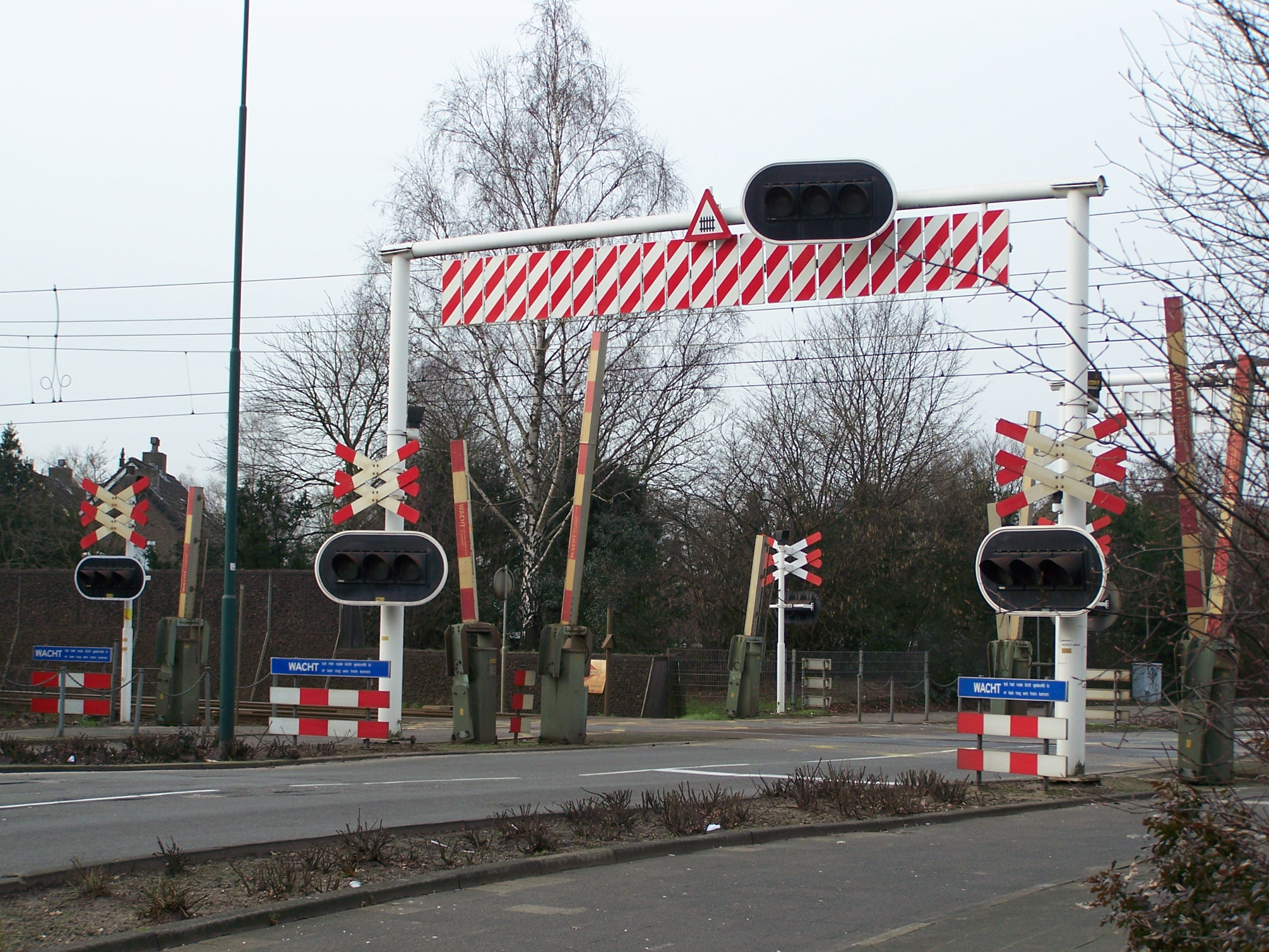 DubbeleOverwegBomen spoorwegovergang in Bilthoven.